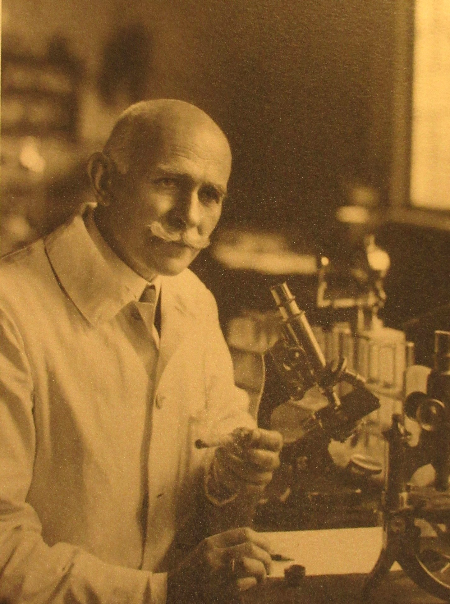 Constant Griebel am Arbeitsplatz